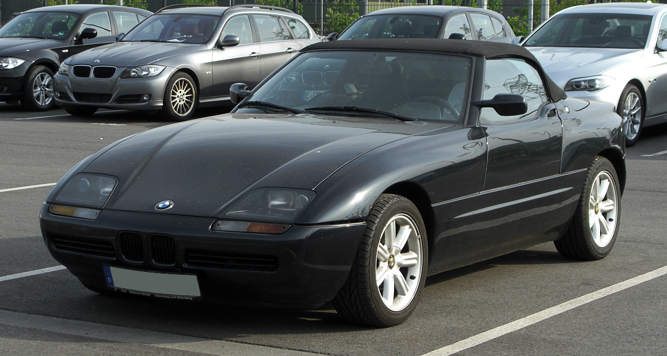 BMW Z1